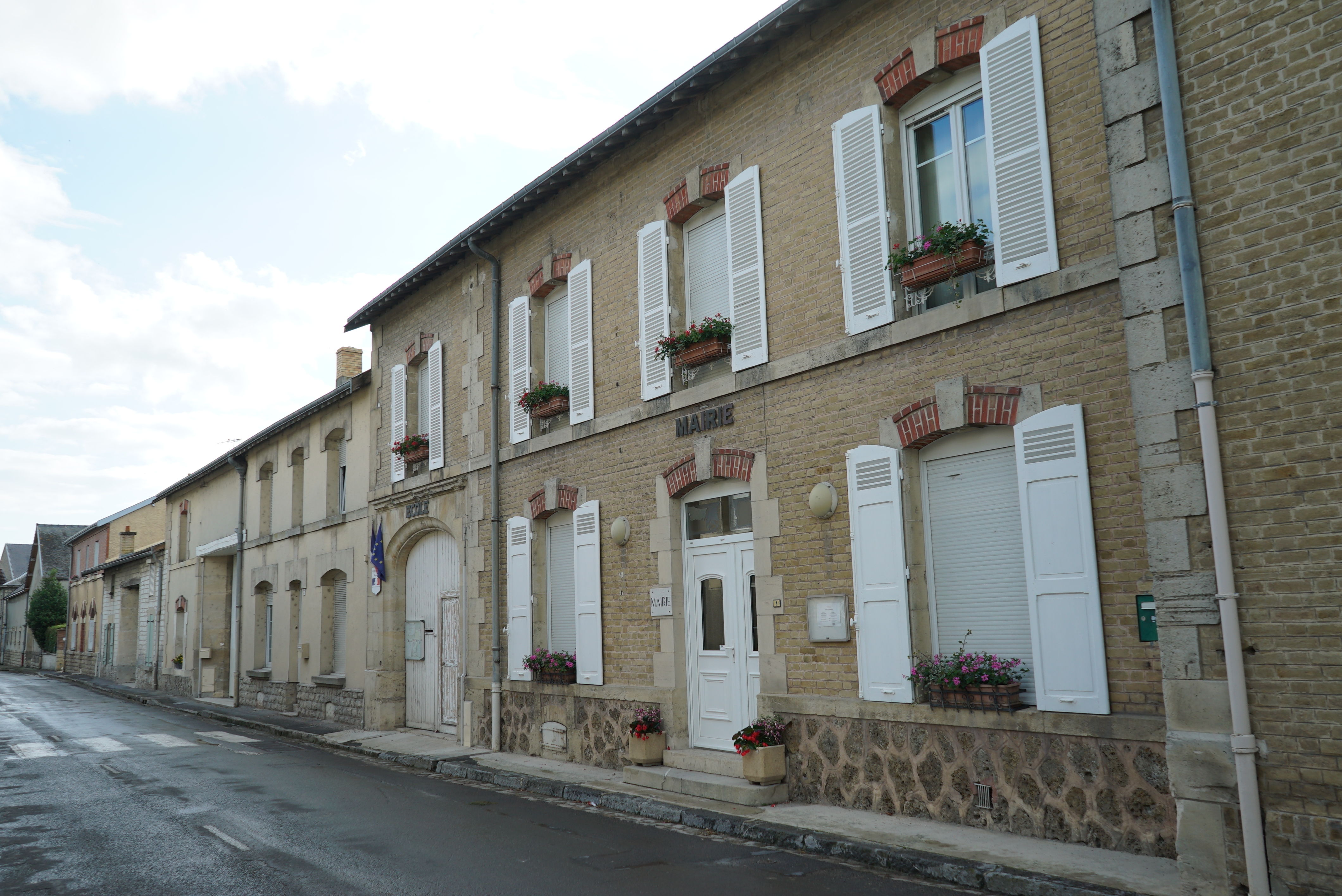 salle municipale et monument aux laboureurs.